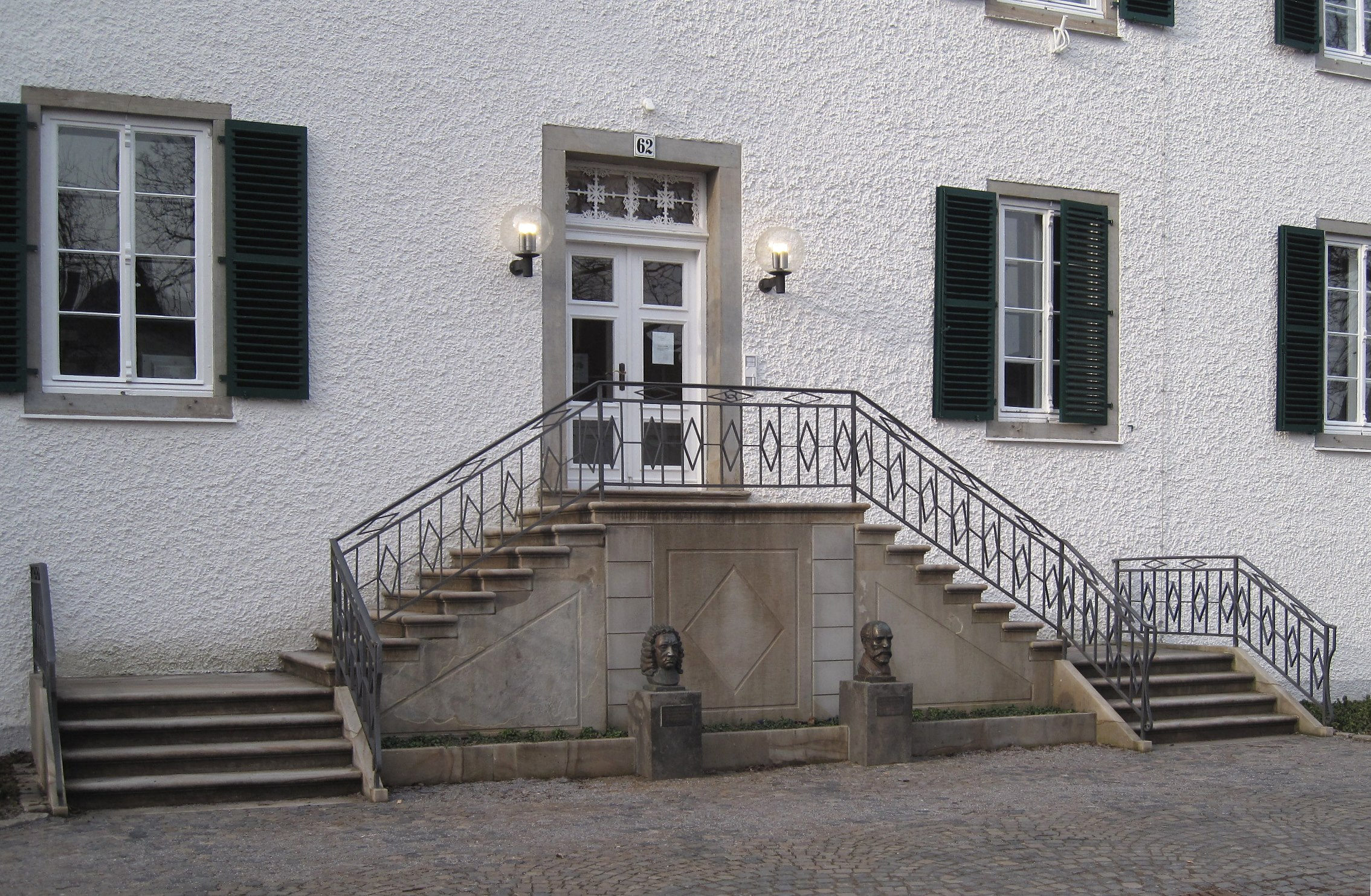 Haus Letmathe in Iserlohn-Letmathe, Hagener Straße 62-64. Baudenkmal seit 23. Juni 1983